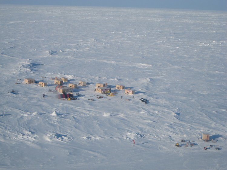 APLIS 2007 Ice Camp, camp du lieu de tournage de Stargate Continuum